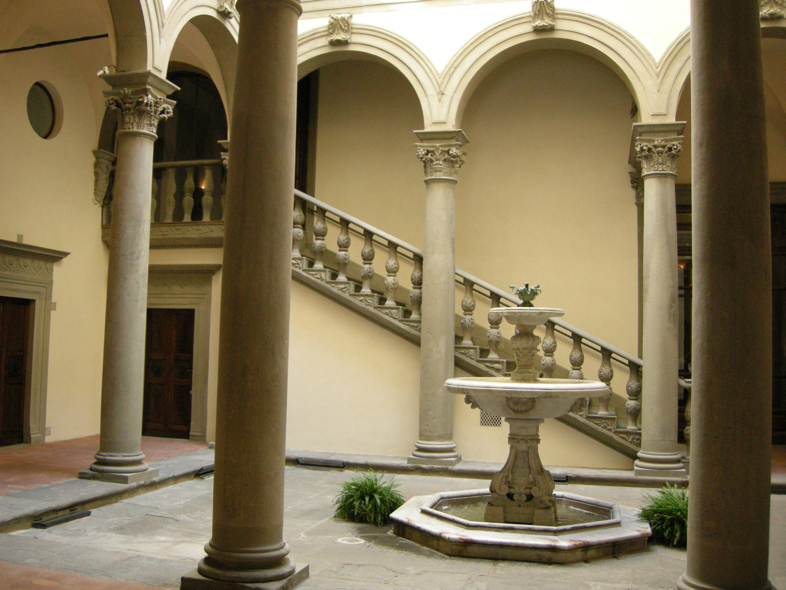 Palazzo gondi, cortile